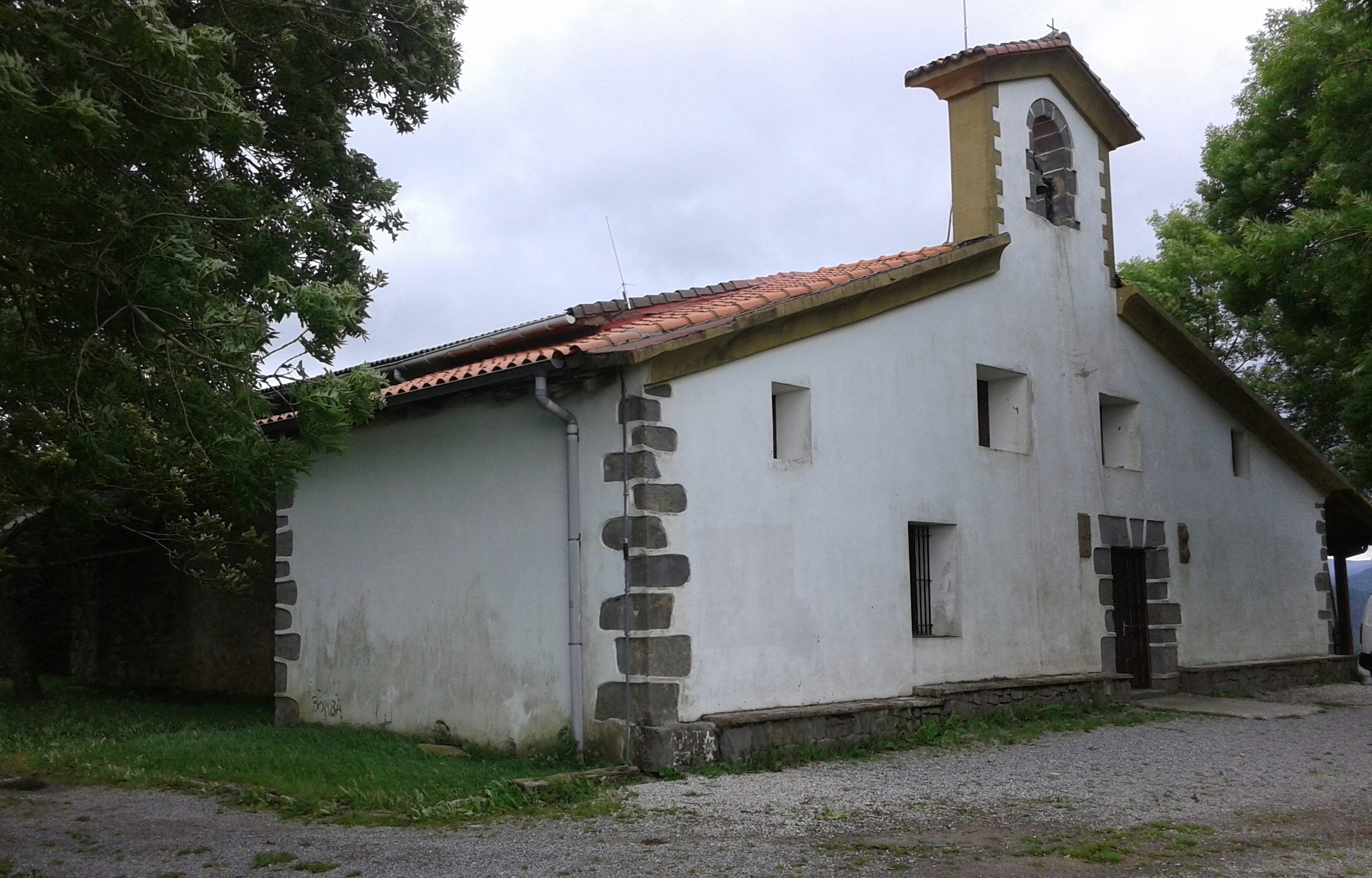 Santiagomendi baseliza, Astigarragako izen bereko mendian.